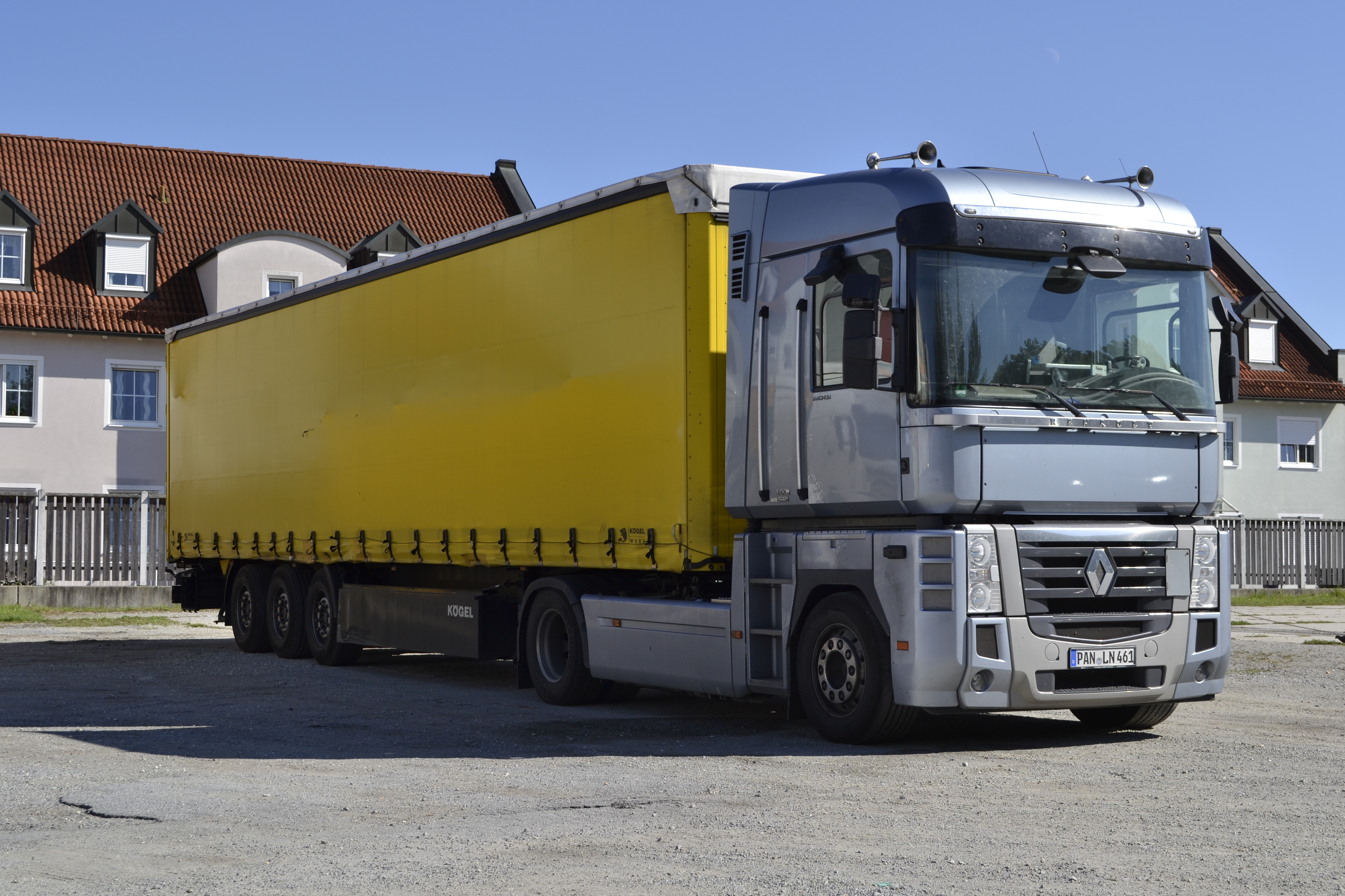 Renault Magnum 500 LKW.